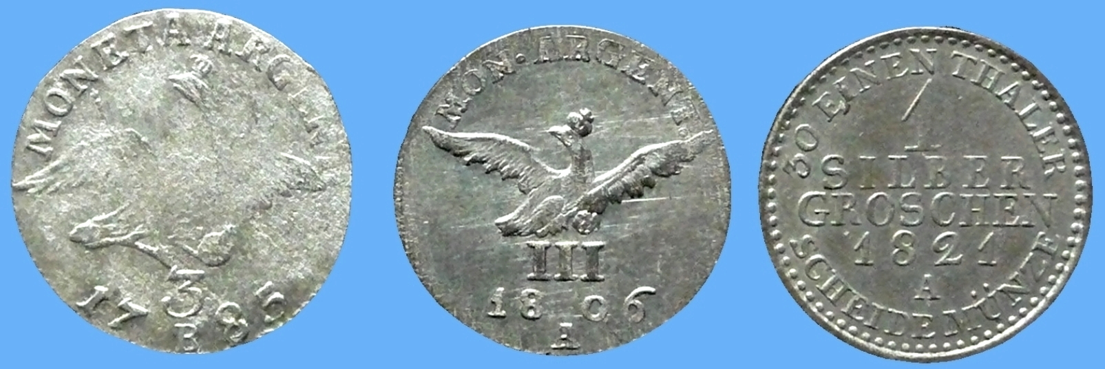 Silbergroschen der Provinz Schlesien und des Königreichs Preußen Revers links: 1785 Münzstätte Breslau Prägung von 1771-1786 mitte: 1806 Prägung Münzstätten Berlin 1806-1807 und Glatz 1807-1808 rechts: 1821 Münzstätte Berlin gemäß Münzverfassung vom 30.09.1821